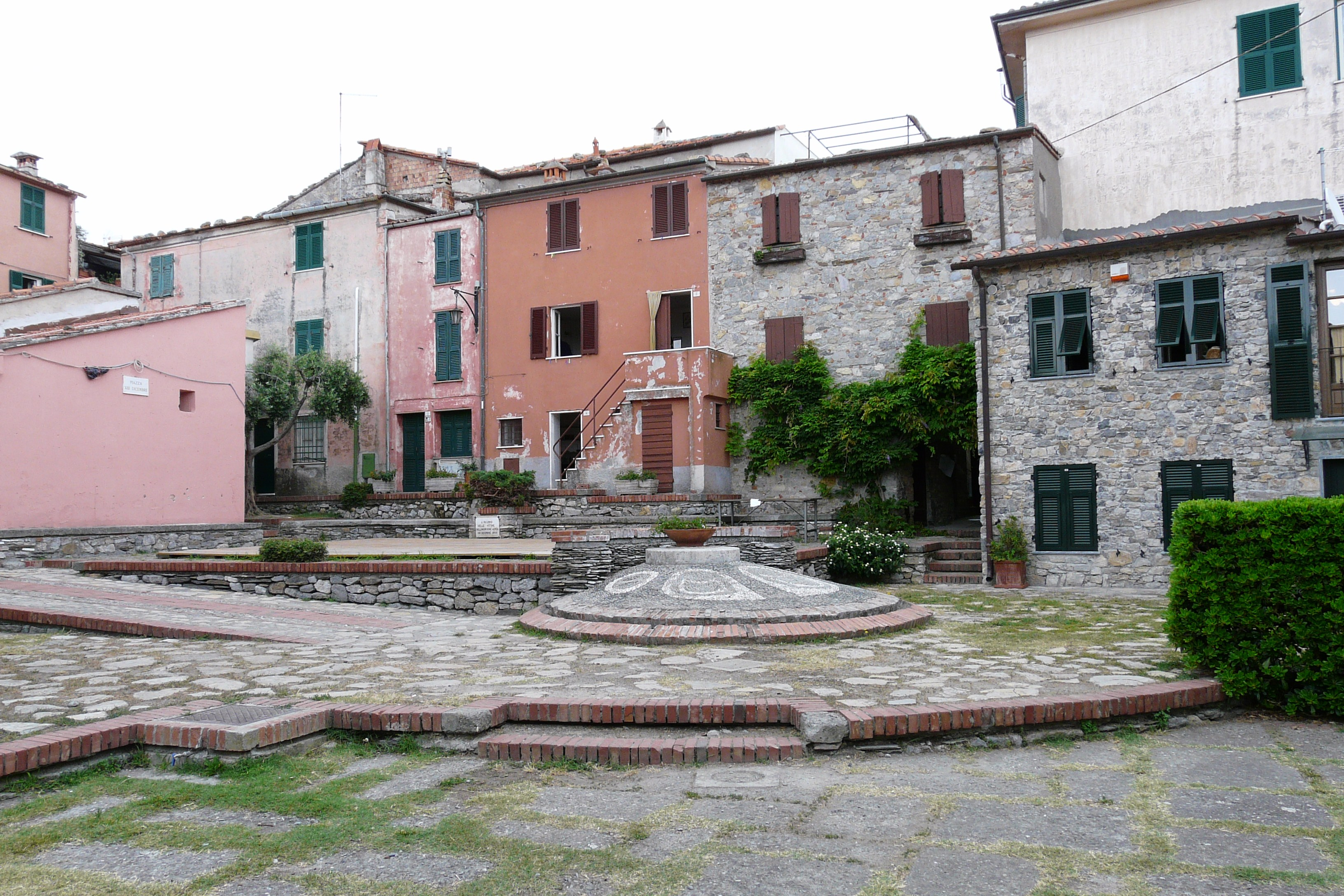 Montemarcello, Ameglia, Liguria, Italia